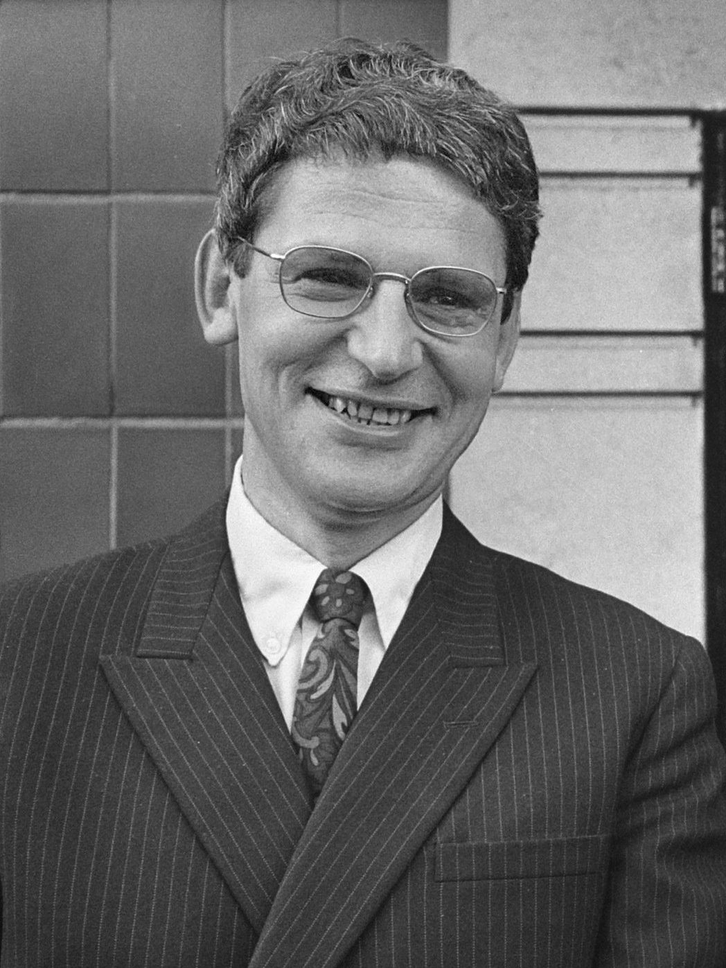 Dimitri Frenkel Frank 15 oktober 1966